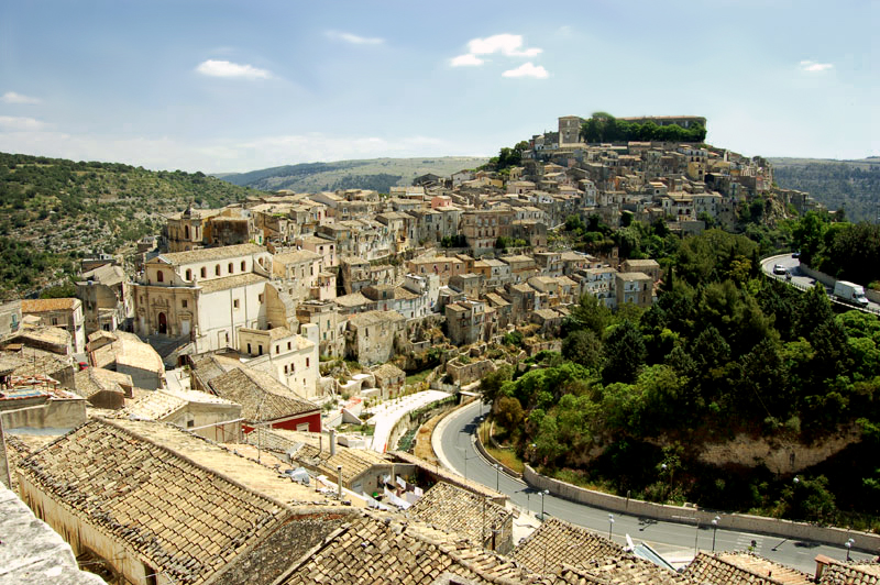 Panorama di Ragusa Ibla, Sicilia, Italia.